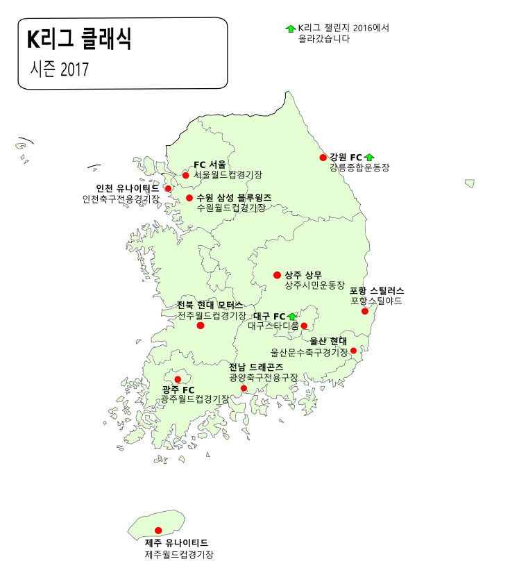 케이리그클래식의경기장들